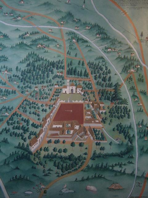 IMAGEN DE COPIA DEL LIENZO B DE ACAXOCHITLÁN